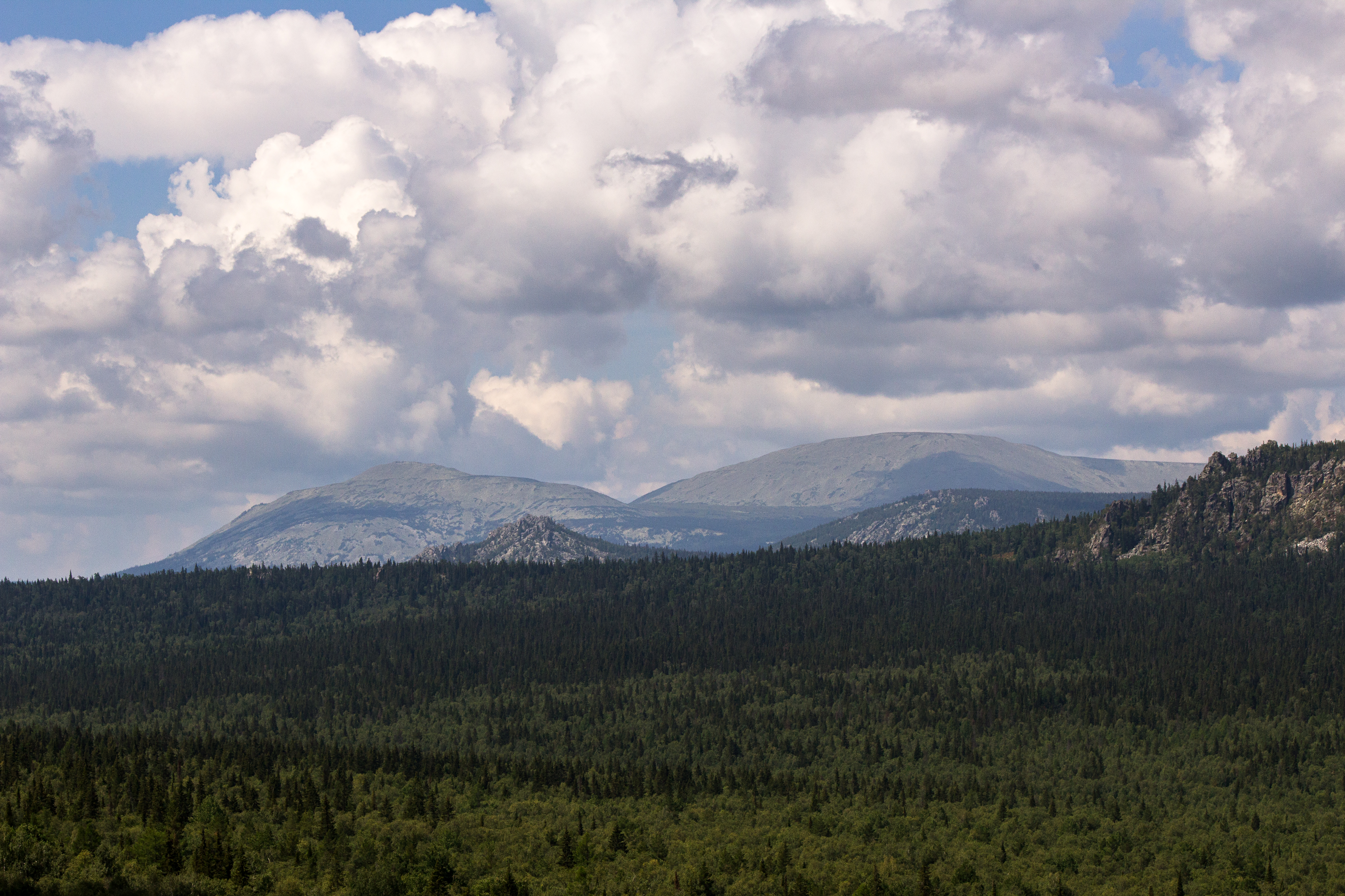 Южно-Уральский (Ч): Катав-Ивановский район, Челябинская область This image is related to the protected area of Russia number 7400141